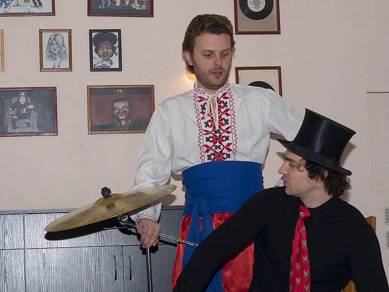 Хамерман Знищує Віруси (Hamerman Eradicates Viruses) just before their gig in Dniepropetrovsk on 2007-02-24.